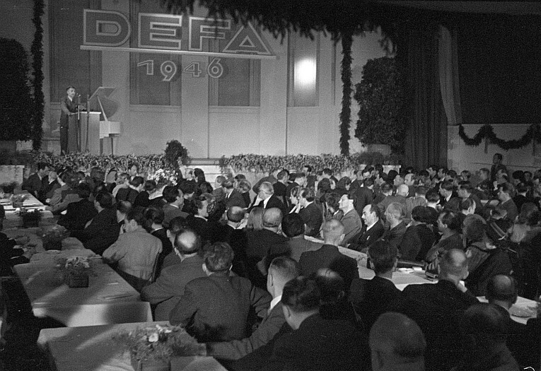 Original image description from the Deutsche Fotothek Porträt: Dirigent Boulanger